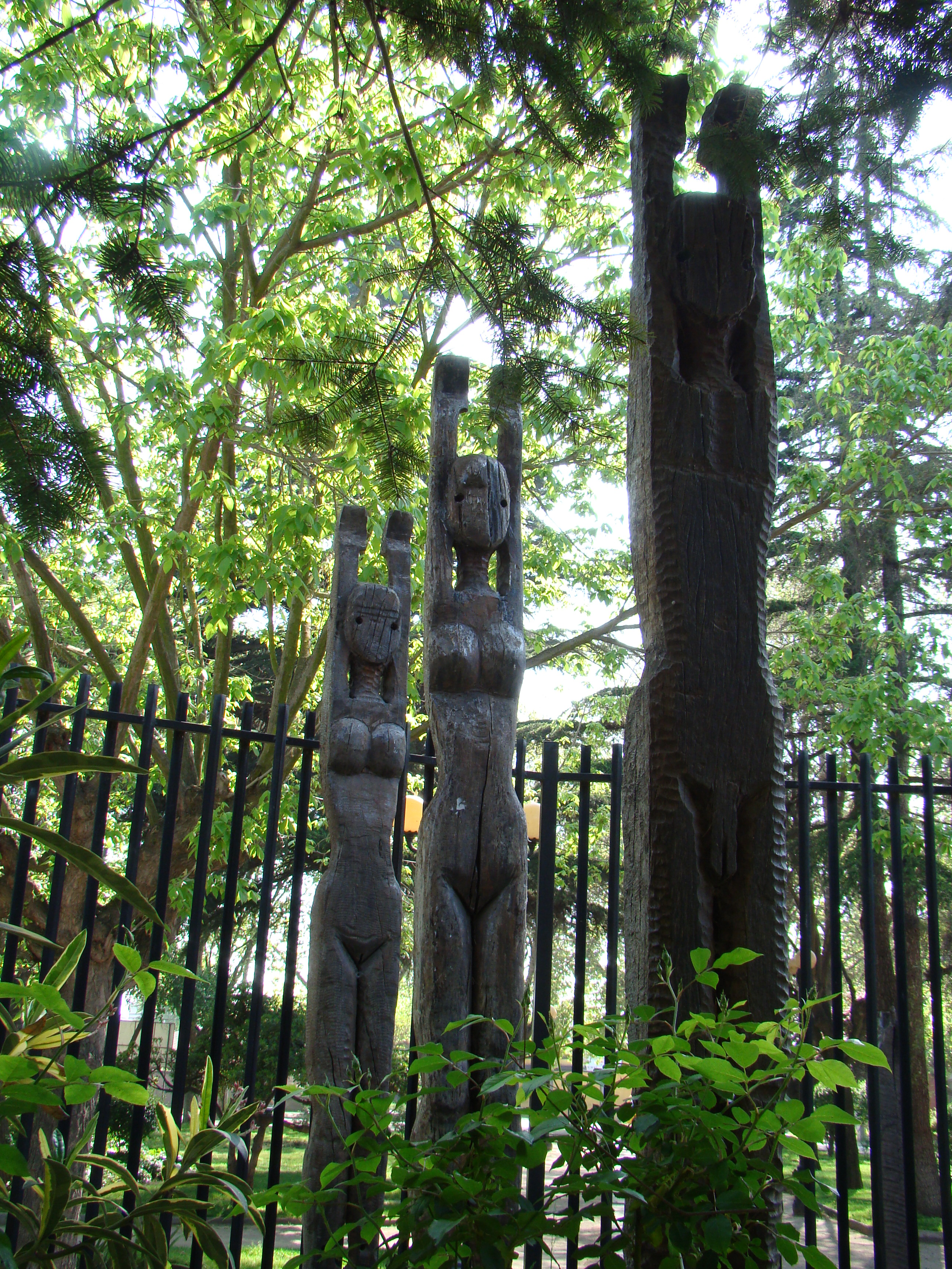 Memorial conmemorativo de la violación de los DDHH en Chile durante el régimen de Pinochet